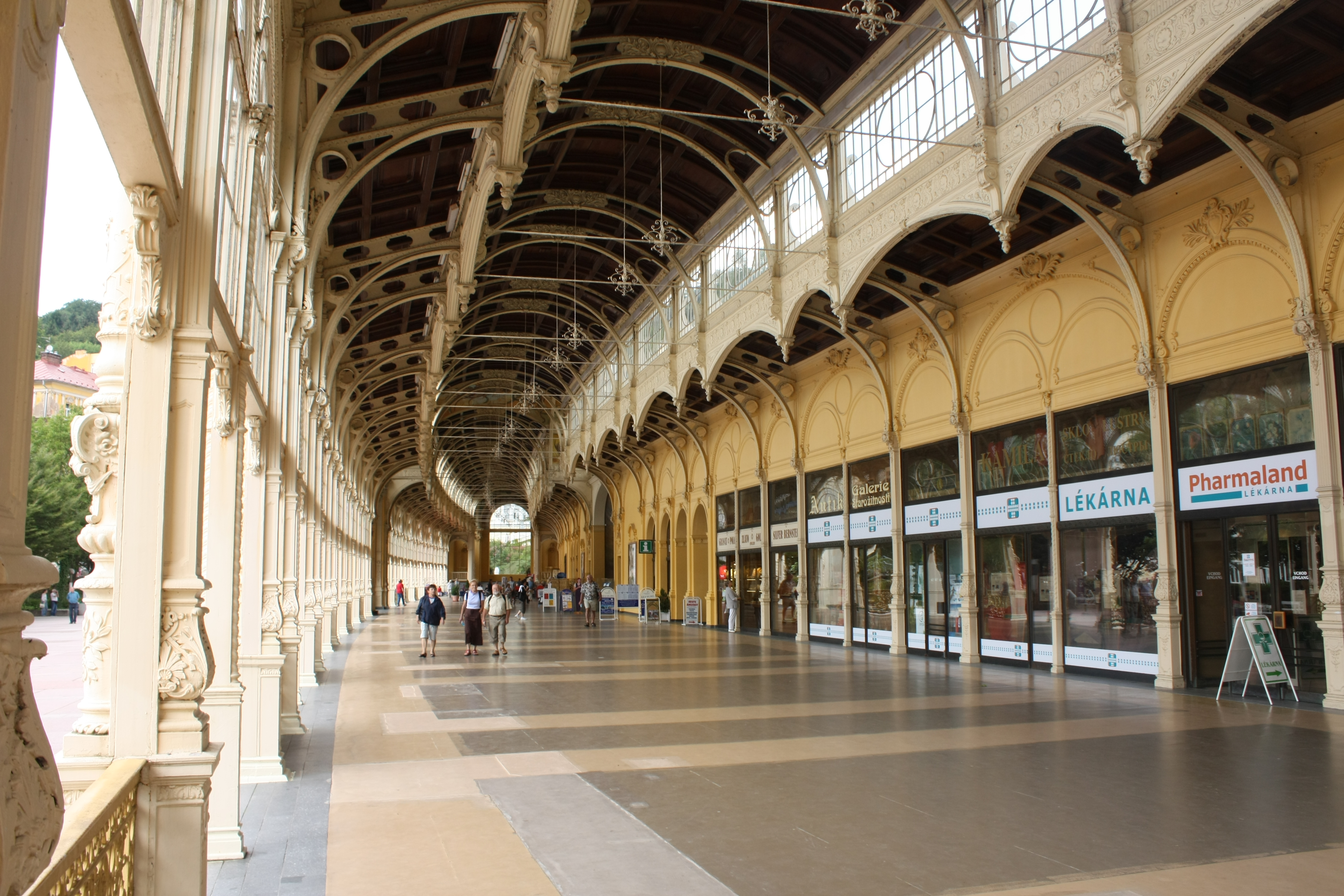 Kolonade Marienbad